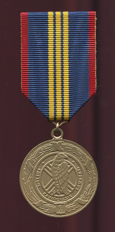 Медаль «За безупречную службу в комитете национальной безопасности» 3 степени